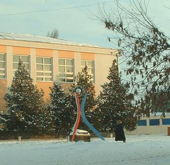 Знак, обозначающий географический центр Краснодарского края. Простоял с 2001 по 2008 г. в г. Кореновске